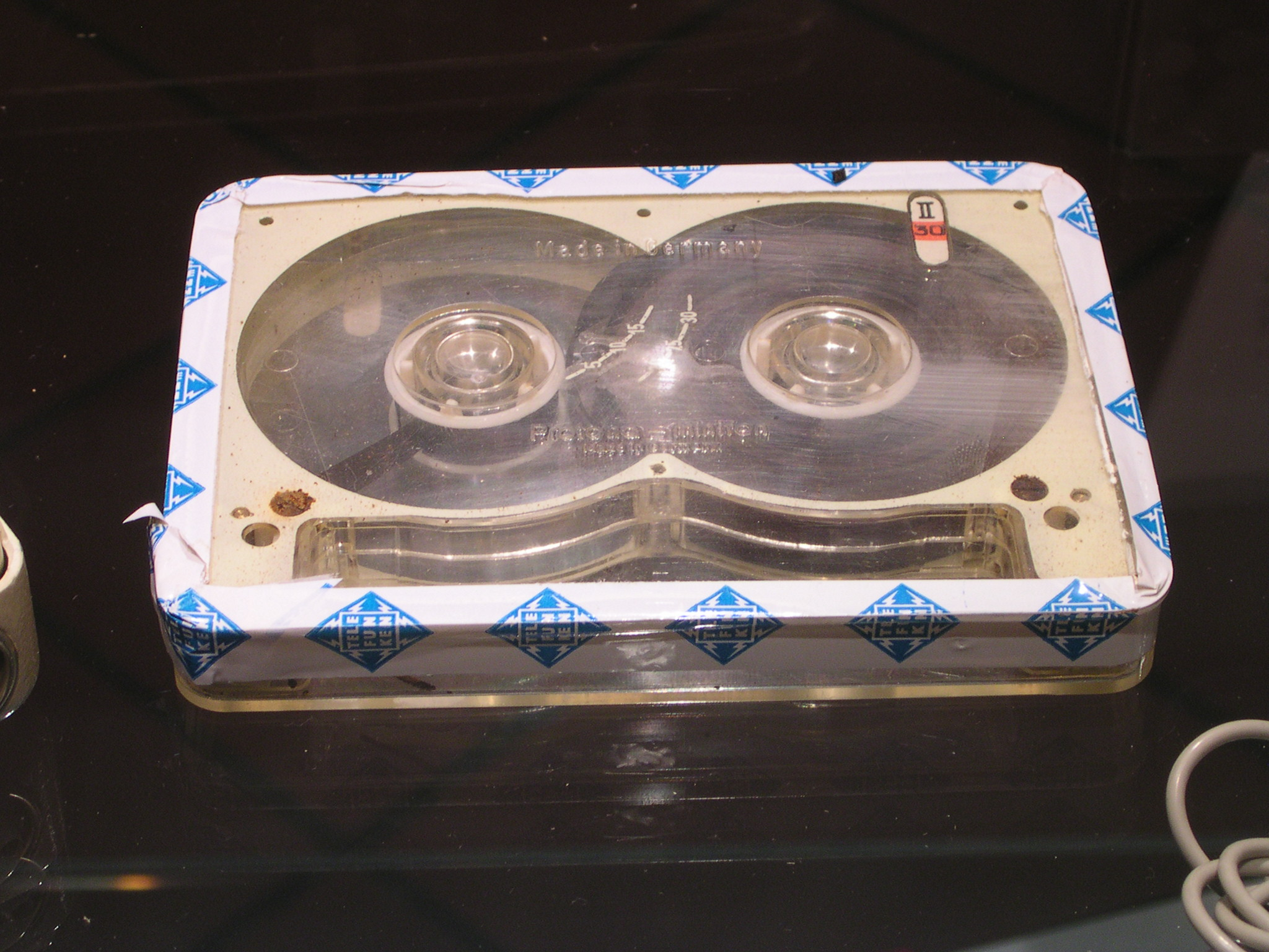 Protona Minifon Attaché, Bauzeit 1960-1962, Tonband- oder Diktiergerät, erstmals mit einer Bandcassette